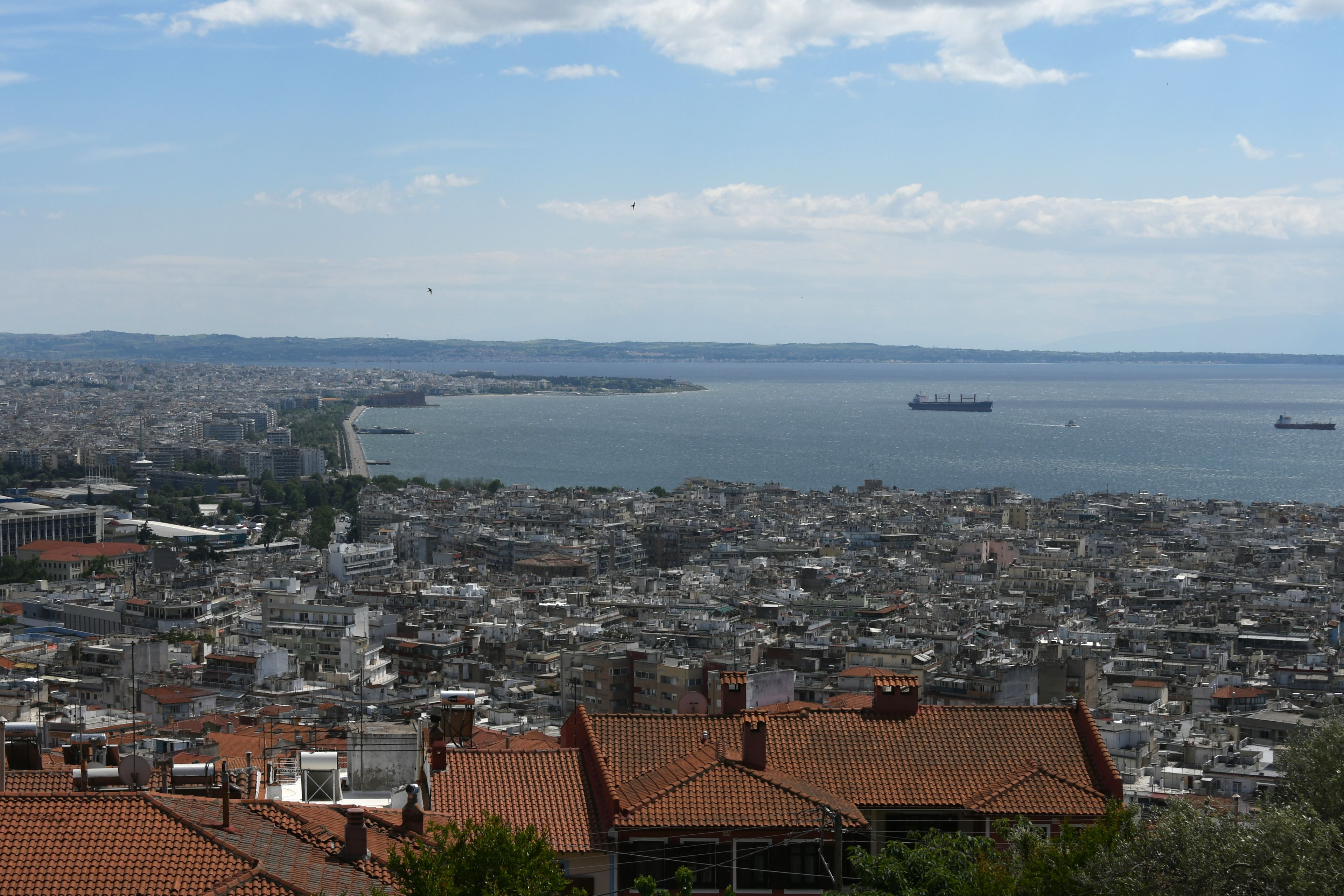 Thessaloniki, Ausblick vom Kloster Vlatadon (Μονή των Βλατάδων) (14. Jhdt.)